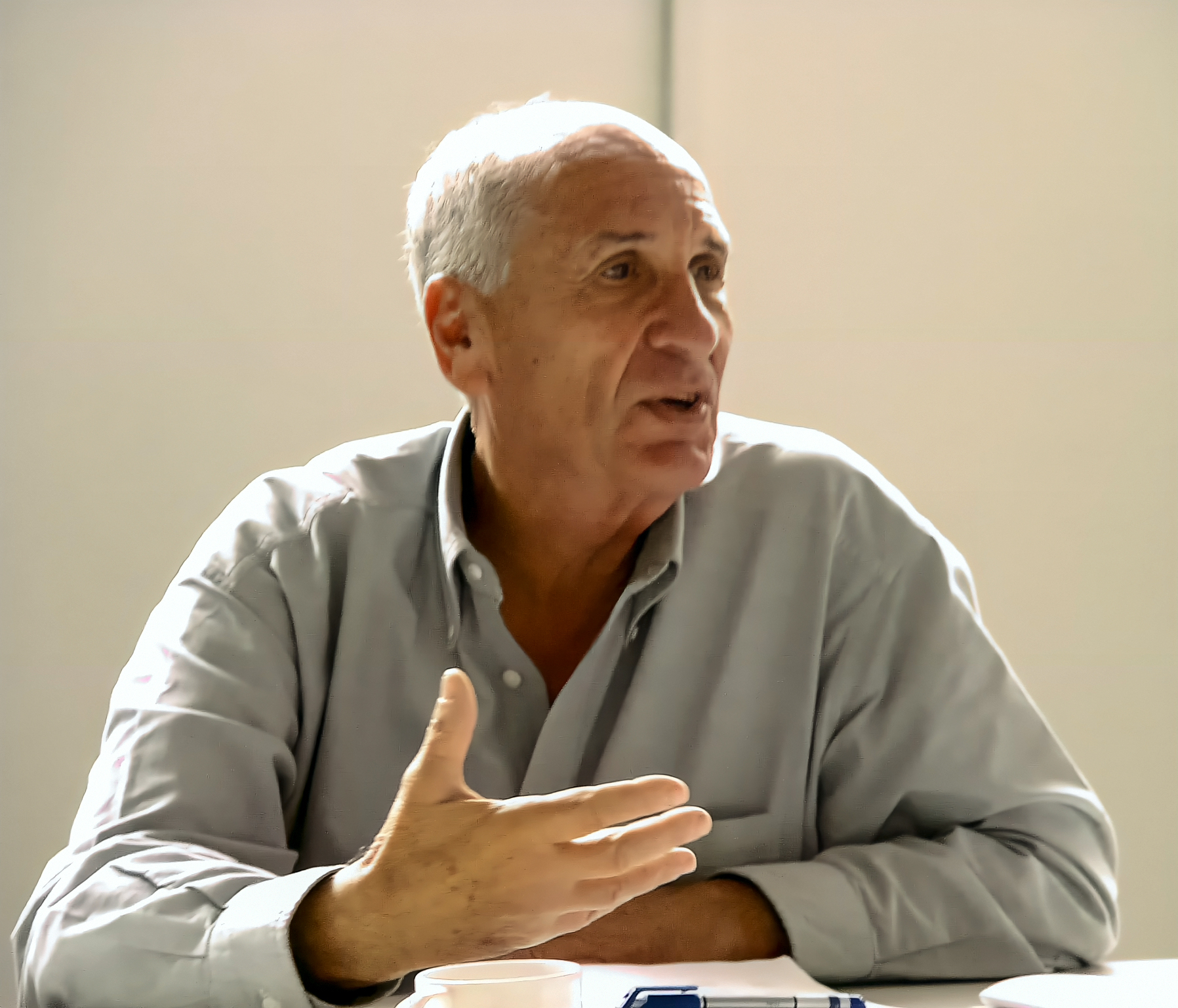 אדם מזור - פרופ', אדריכל ומתכנן ערים